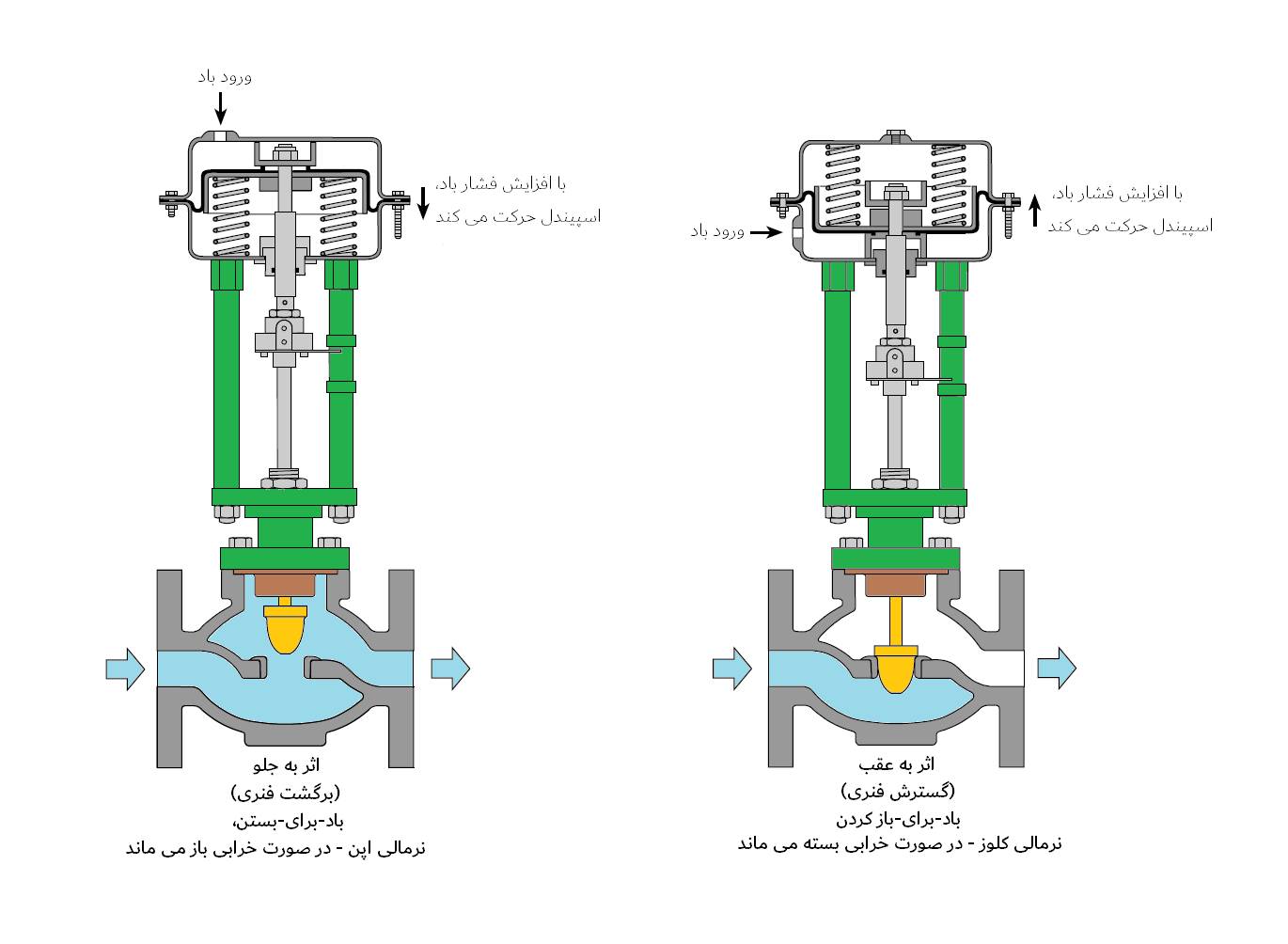 شیر و عملگر نیوماتیکی